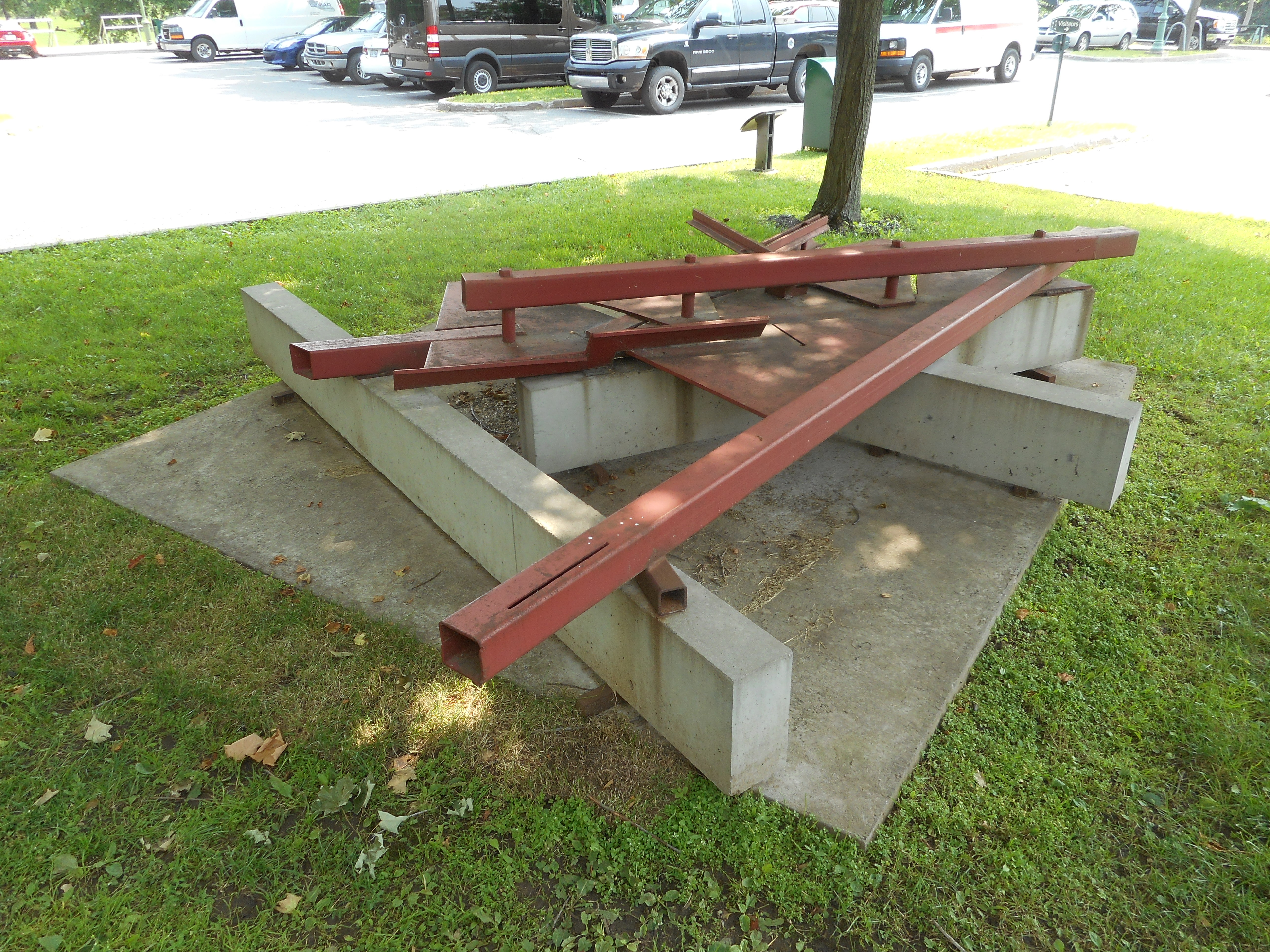 Jacks est une sculpture de Henry Saxe, réalisée en 1977 et 2009 (socle), située dans le Jardin de sculptures Julie et Christian Lassonde qui borde le Musée national des beaux-arts du Québec.